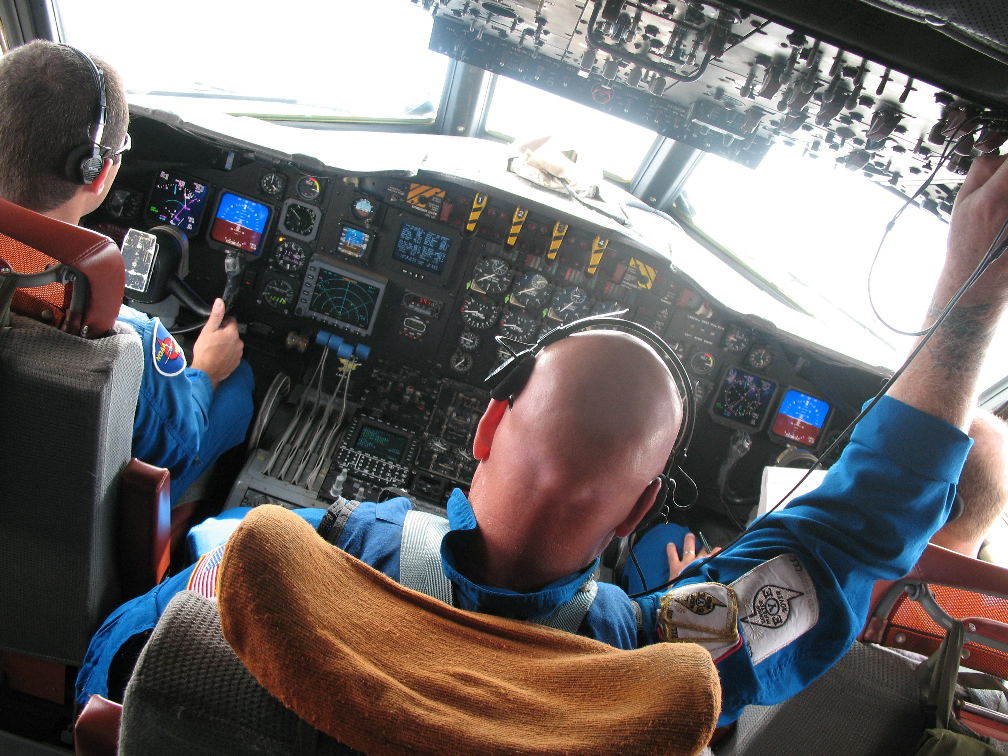 fly01018